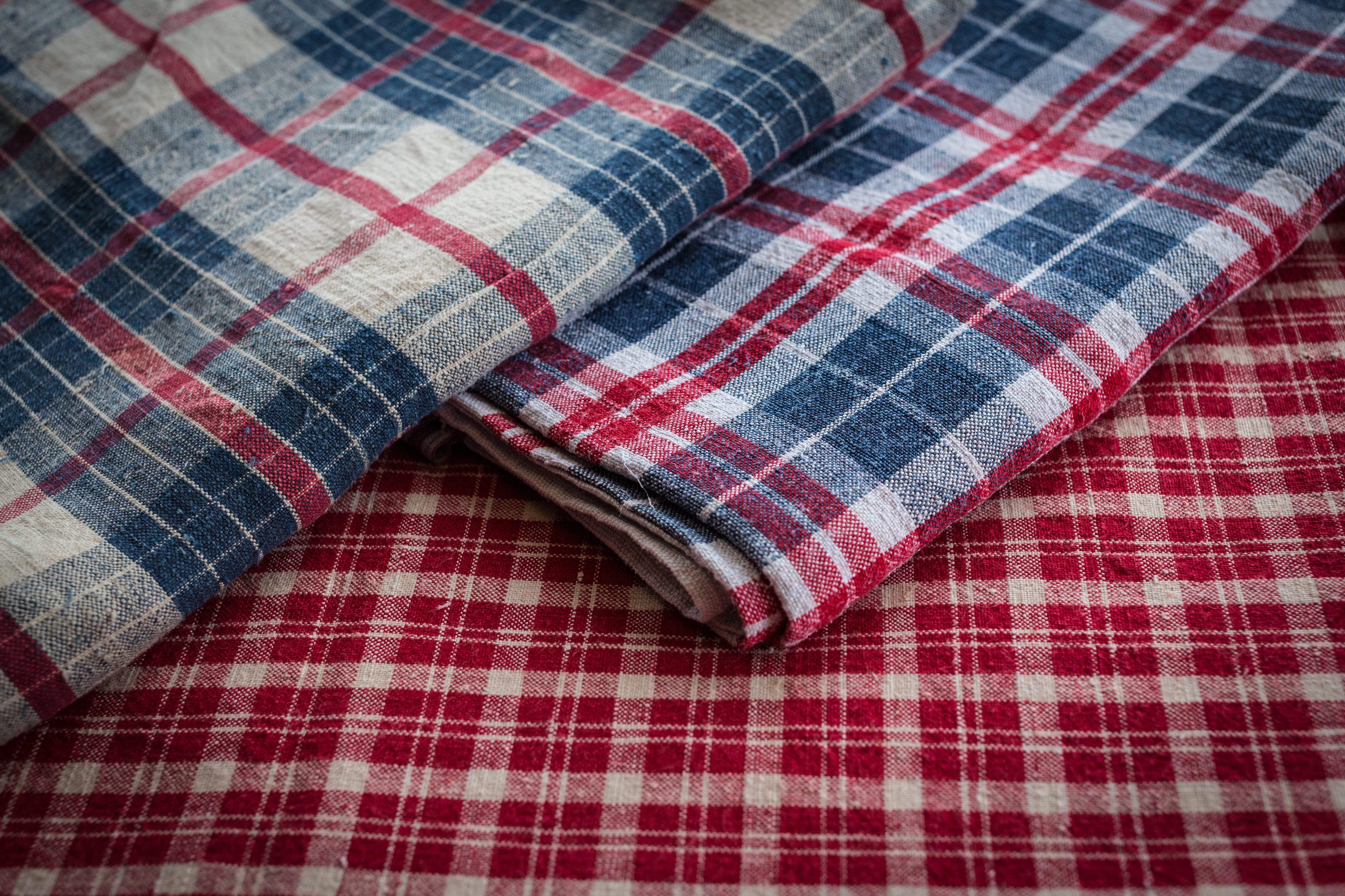 Collection de kelsch du Musée alsacien de Strasbourg.